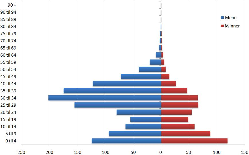 De Forente Arabiske Emiraters befolkningspyramide fra 1990 (per tusen)